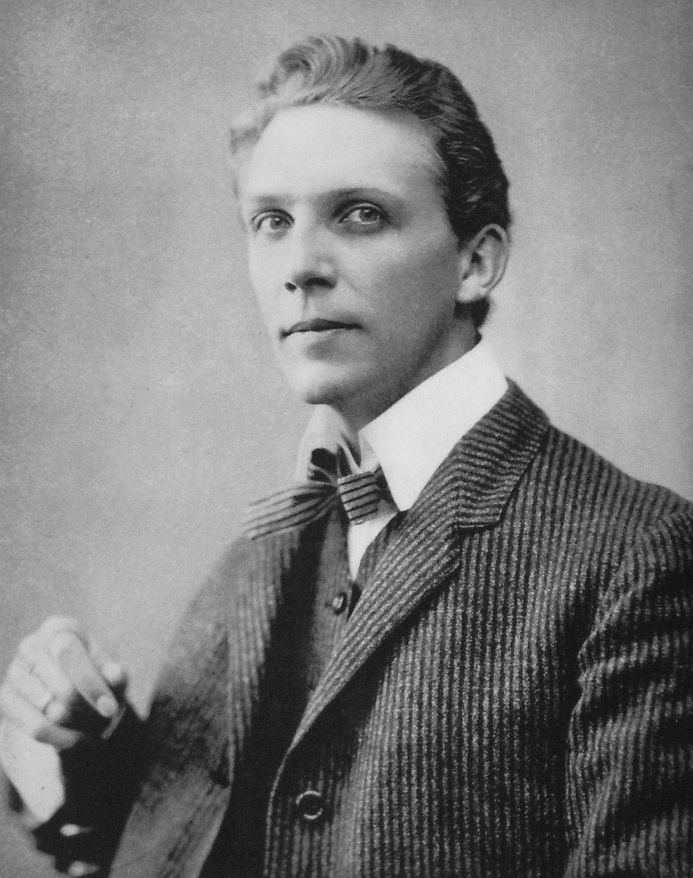 Arkitekt Lars Israel Wahlman